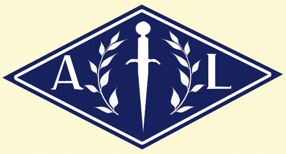 écusson de l'Armée de Libération, mouvement de résistance belge durant la seconde guerre mondiale